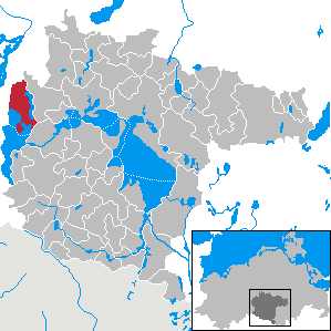 Alt Schwerin in Mecklenburg-Western Pomerania - District Müritz